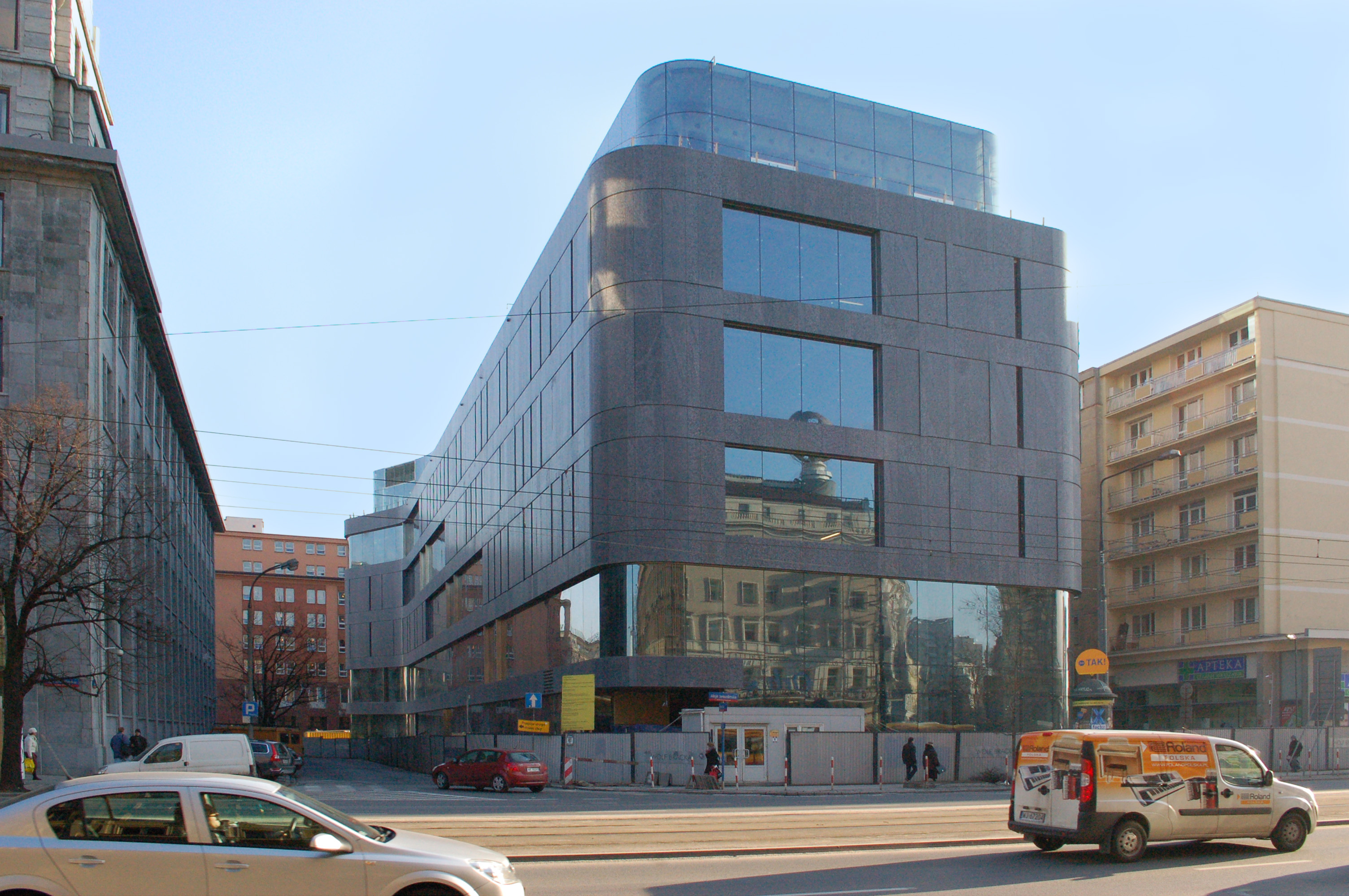 Wolf Bracka